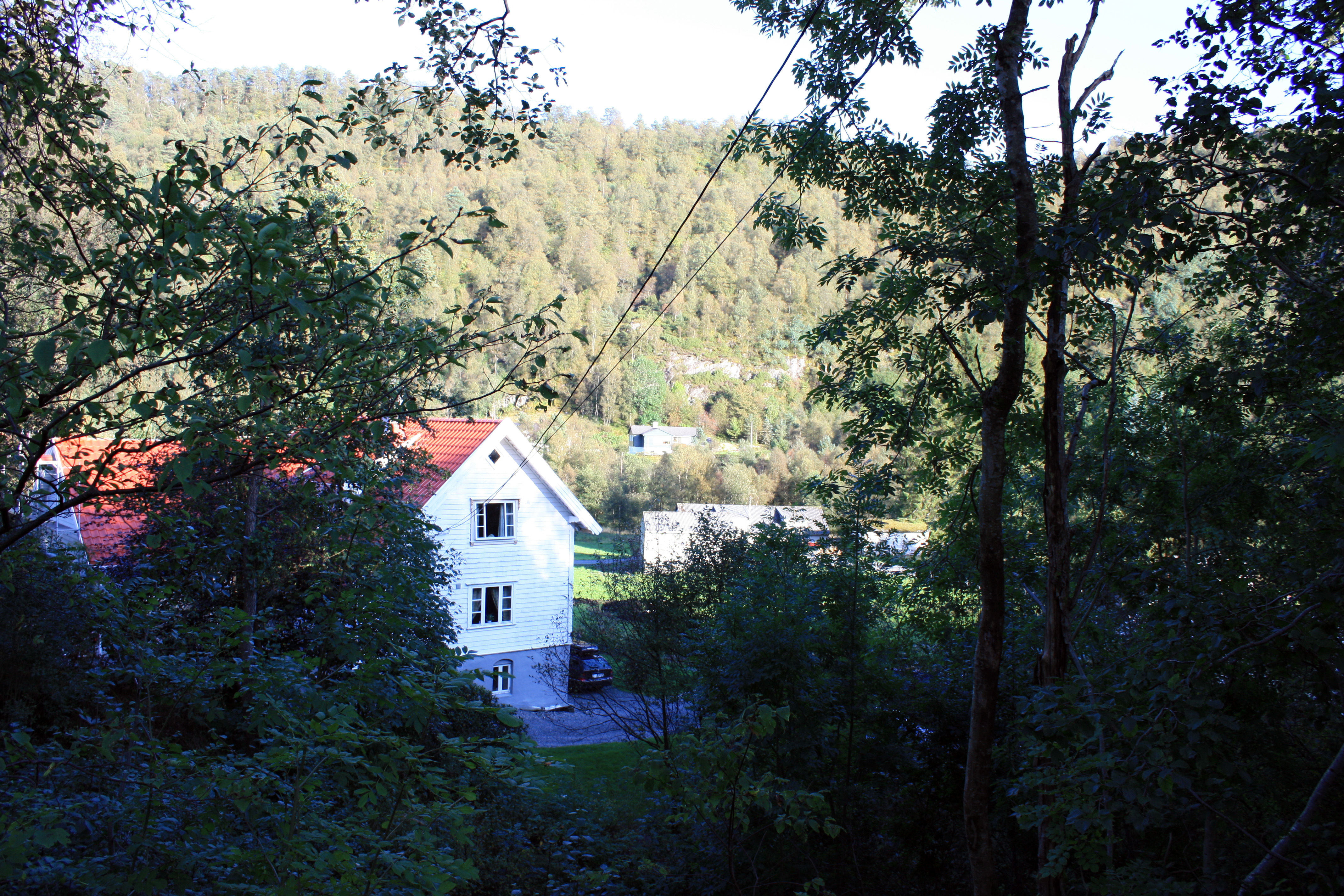 Nedre Dyngeland, Fana, Bergen.